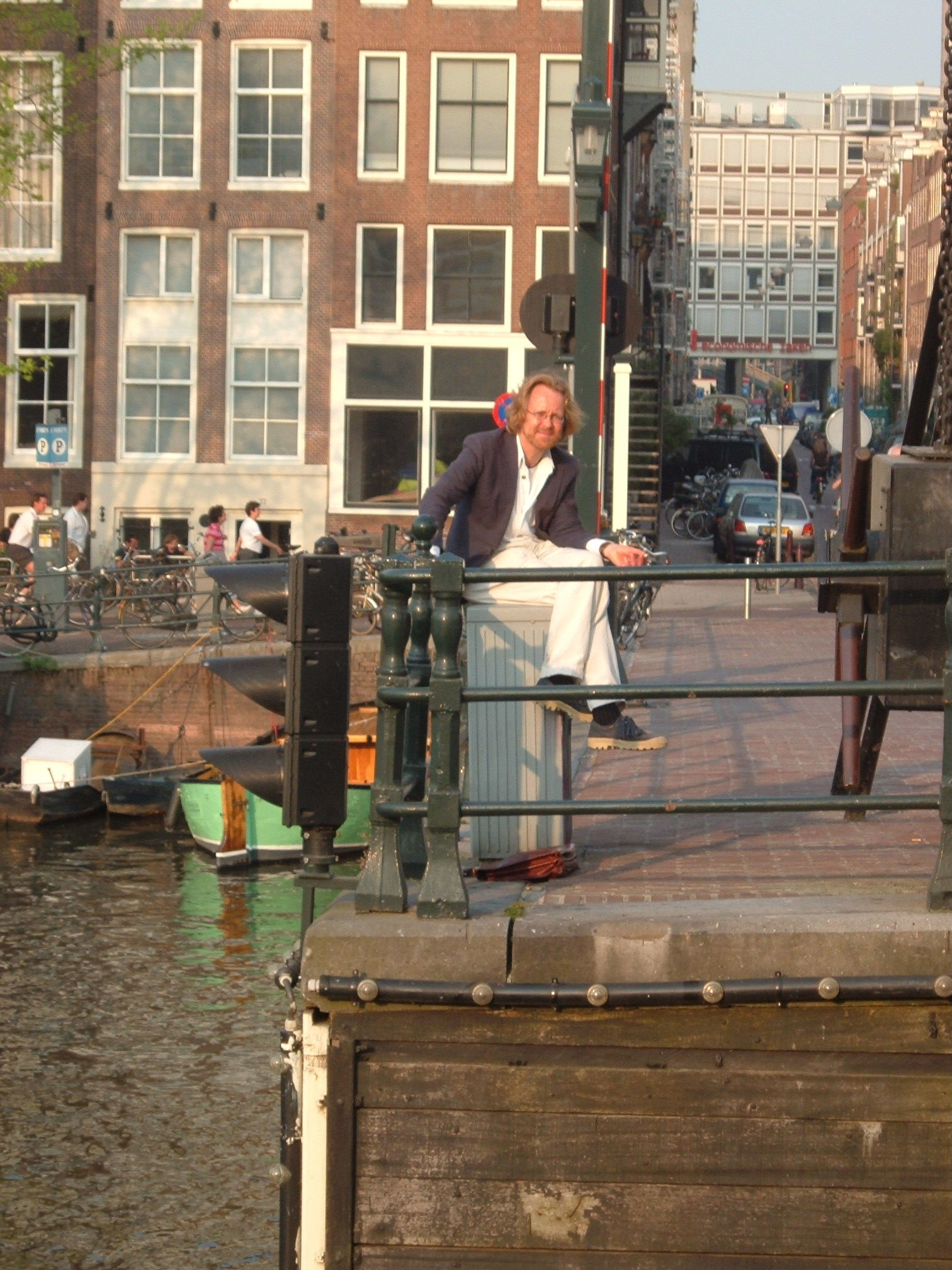 Thomas Rosenboom april 2007 wachtend bij de Magere Brug in Amsterdam